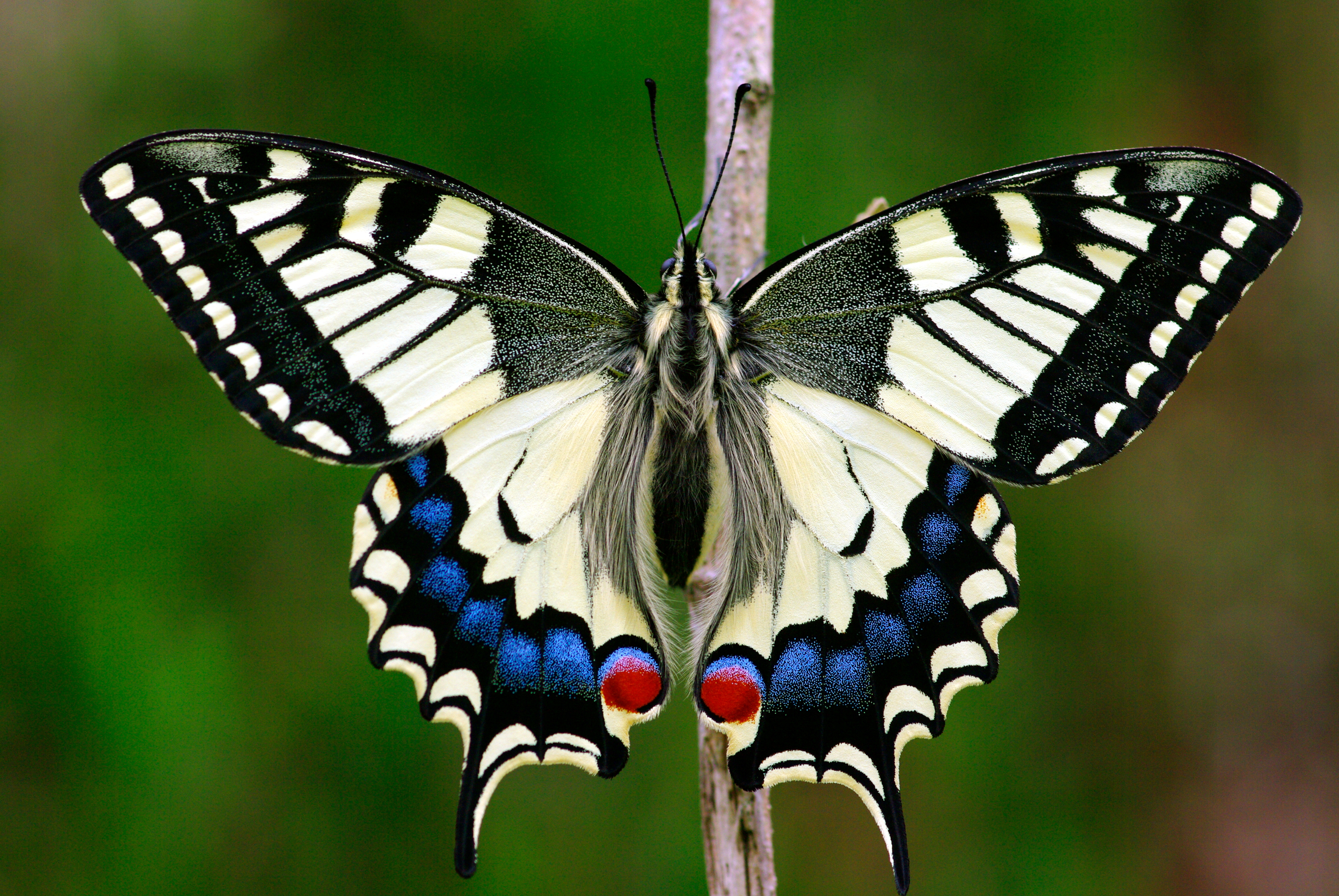 Papilio machaon femelle le jour de l'émergence, Normandie.